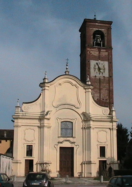 Pieve San Giacomo - Chiesa parrocchiale